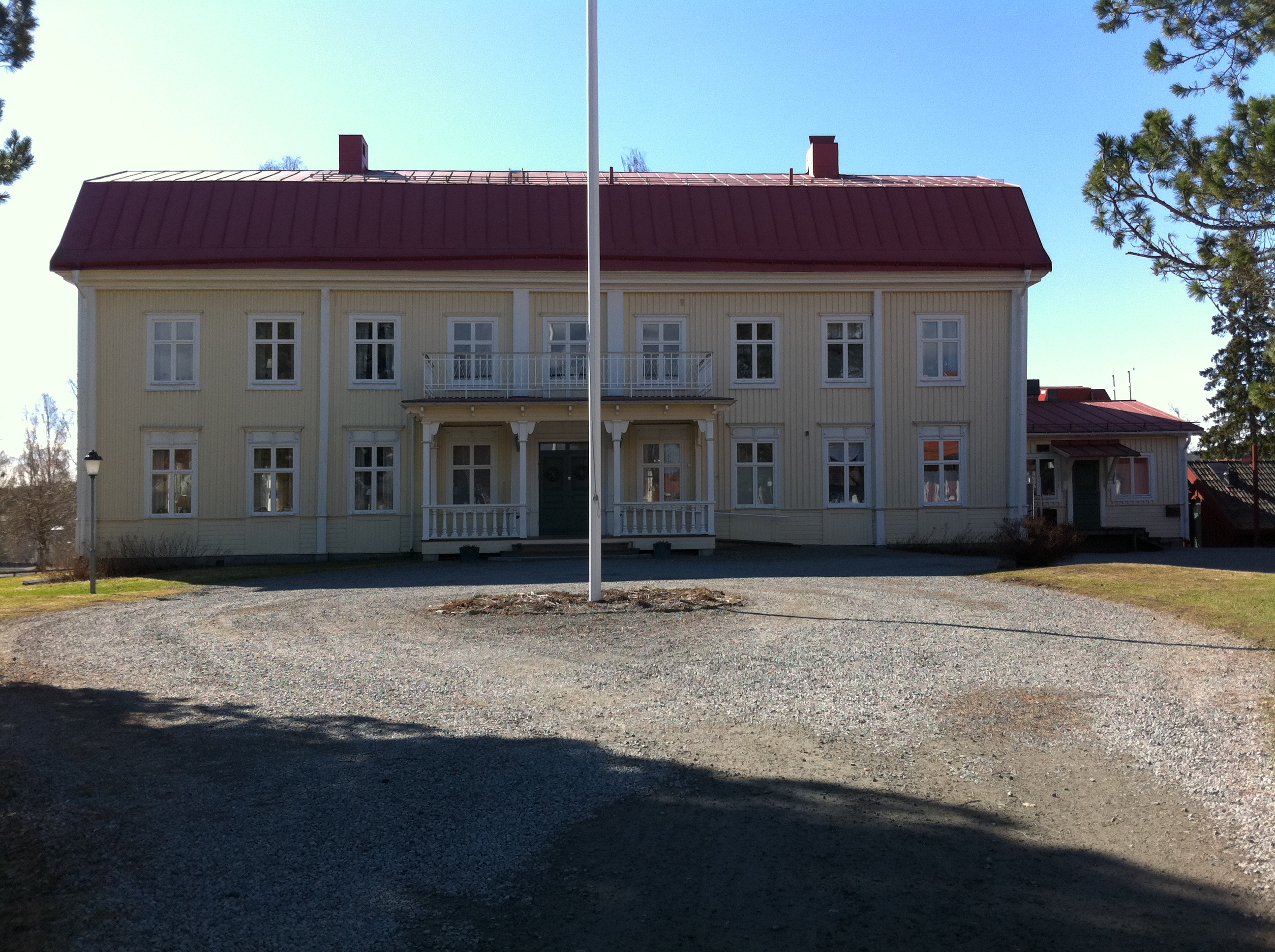 Stiftsgården i Skellefteå. Ett kyrkoherdeboställe byggdes år 1800 för Skellefteå landsförsamlings nye herde Nils Ström – eller snarare hans hustru, som drev fram bygget. Församlingen betalade byggnadsmaterial och kyrkoherden övriga kostnader. Förebilden till den stora huvudbyggnaden var Säbrå biskopsgård utanför Härnösand. Man uppförde också en ladugård för 34 kor och uthus. Det påkostade bygget blev dock tungt för Ströms ekonomi och vid hans död var dödsboet konkursmässigt. Anläggningen blev stiftsgård i Luleå stift 1964 och är idag konferenscentrum med hotell, vandrarhem och restaurang.